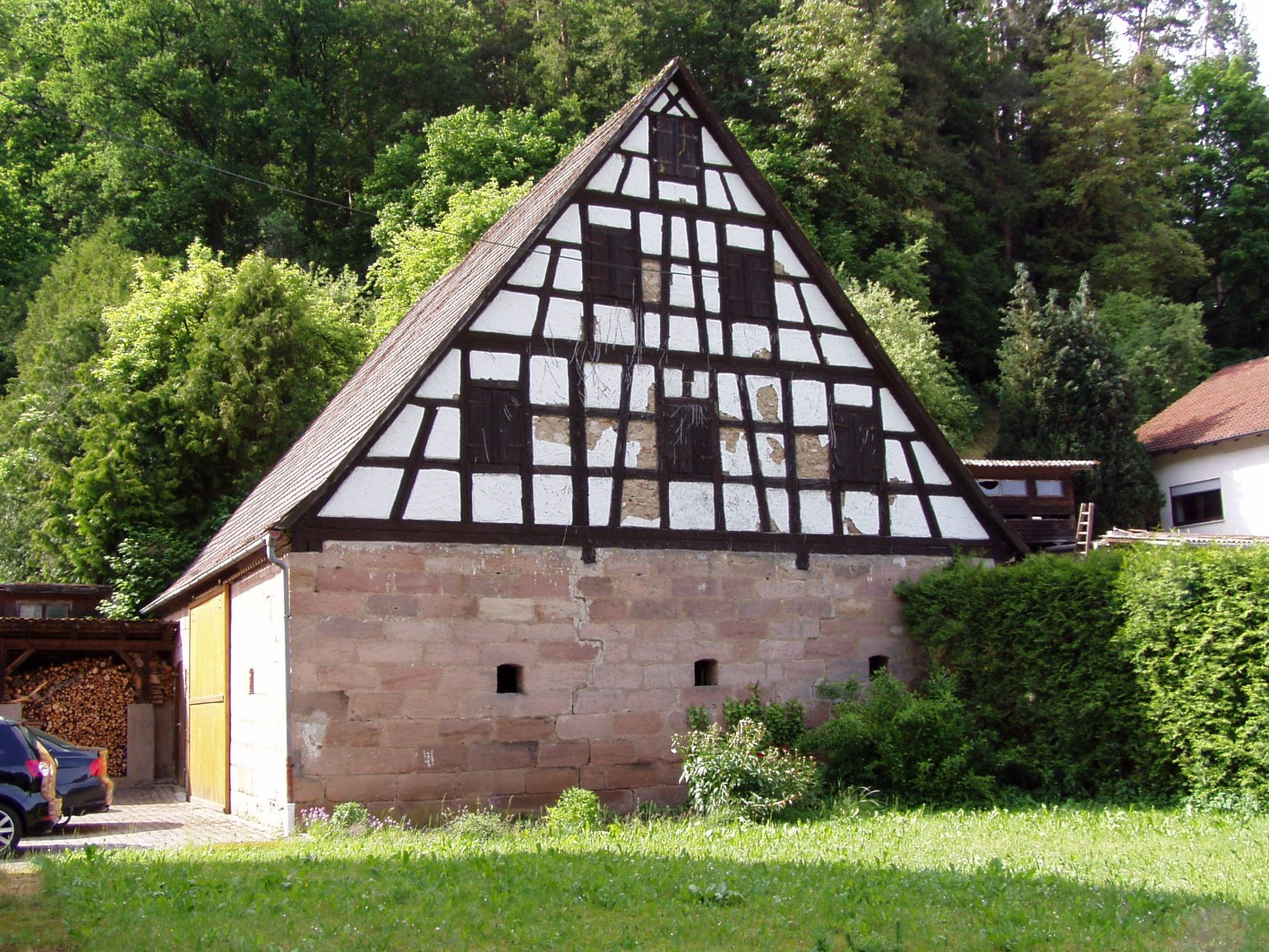 Hohenrad 2 ScheuneThis is a photograph of an architectural monument.